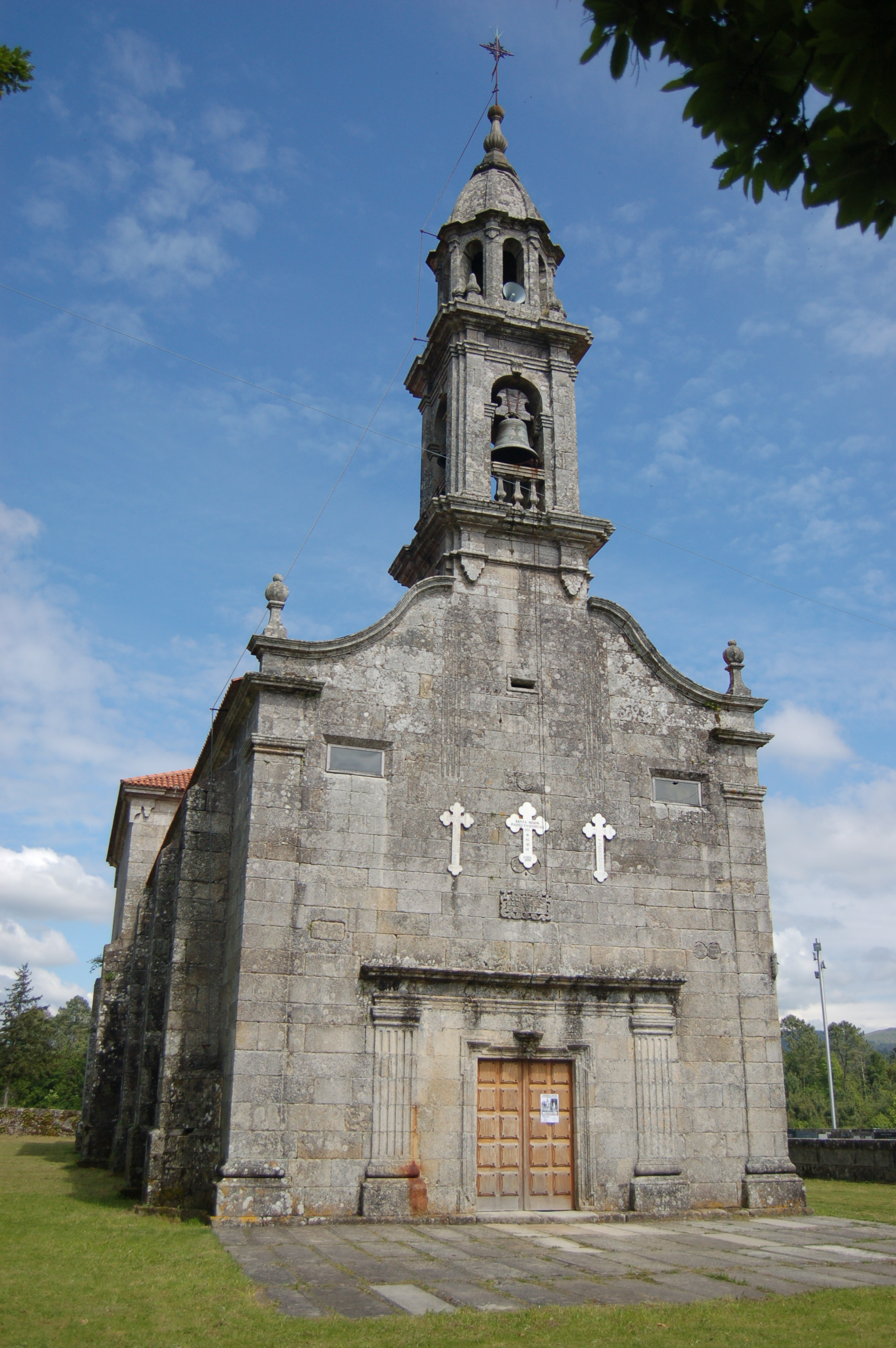 Igrexa parroquial de San Breixo de Barro (Barro)